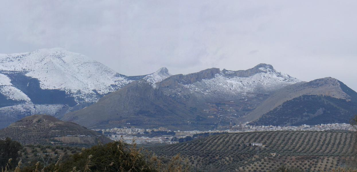 Panorámica de los los Montes de Jaén y Jabalcuz